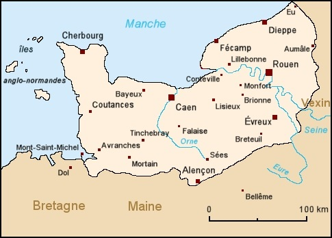 Carte de la Normandie historique (Xe-XIIIe) montrant les principales villes et les régions environnantes.